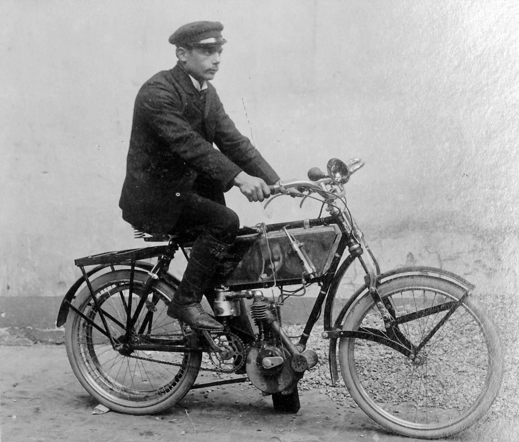 Giuosuè Giuppone sur Peugeot 330